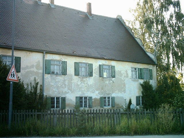 Schlossgut Iglhof in Affing-Iglbach; Ein Wirtschaftsgebäude wurde 2007 abgerissen.